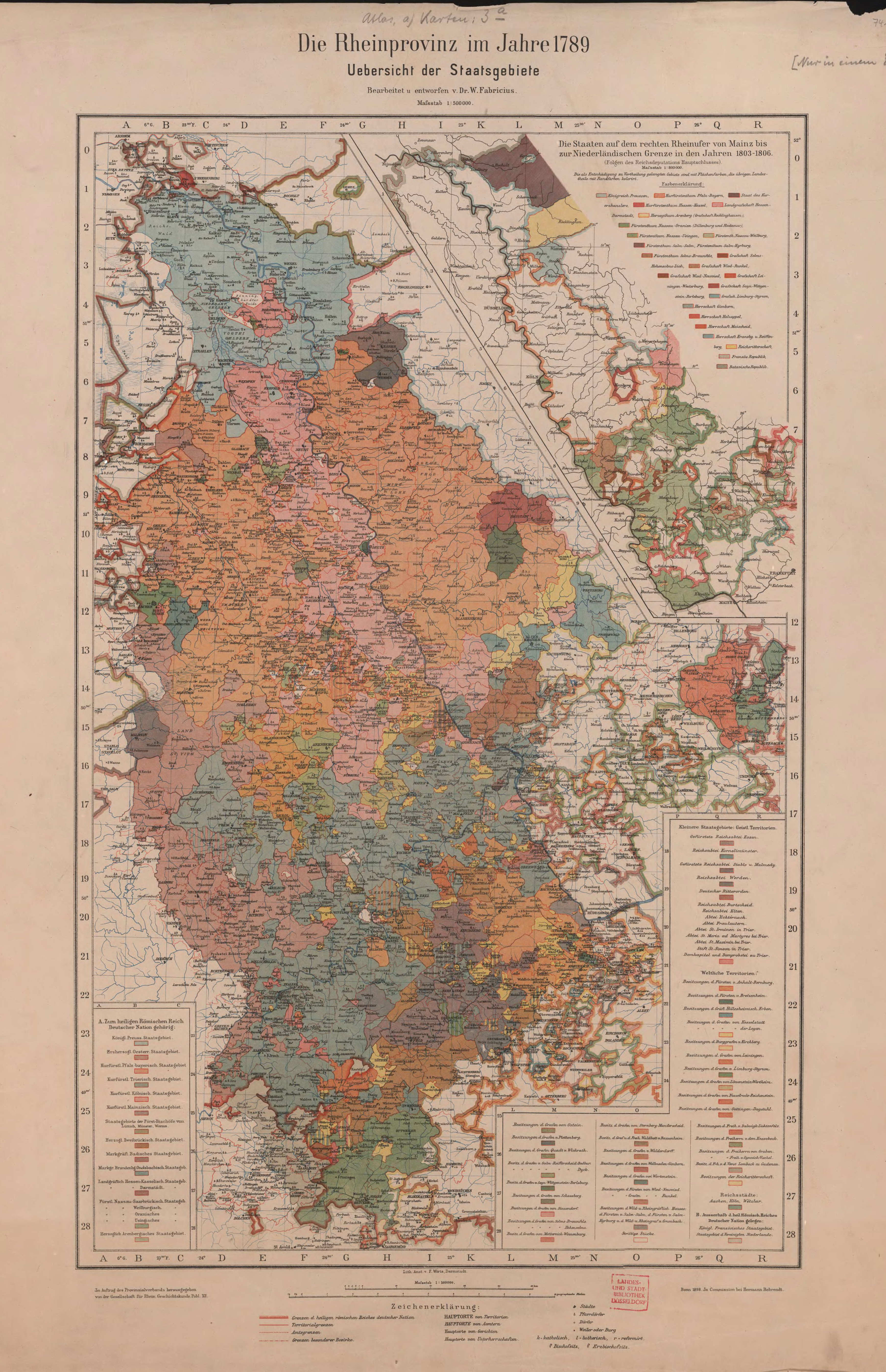 Erläuterungen zum Geschichtlichen Atlas der Rheinprovinz, Die Karte von 1789 (2. Band), Bonn 1898.